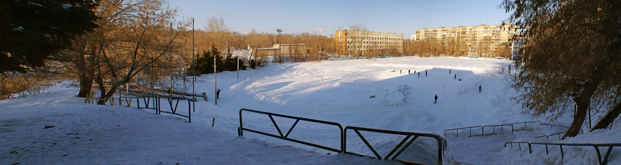 Самара, Стадион «Заря», улица М.Тореза, 144